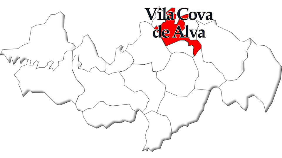 População